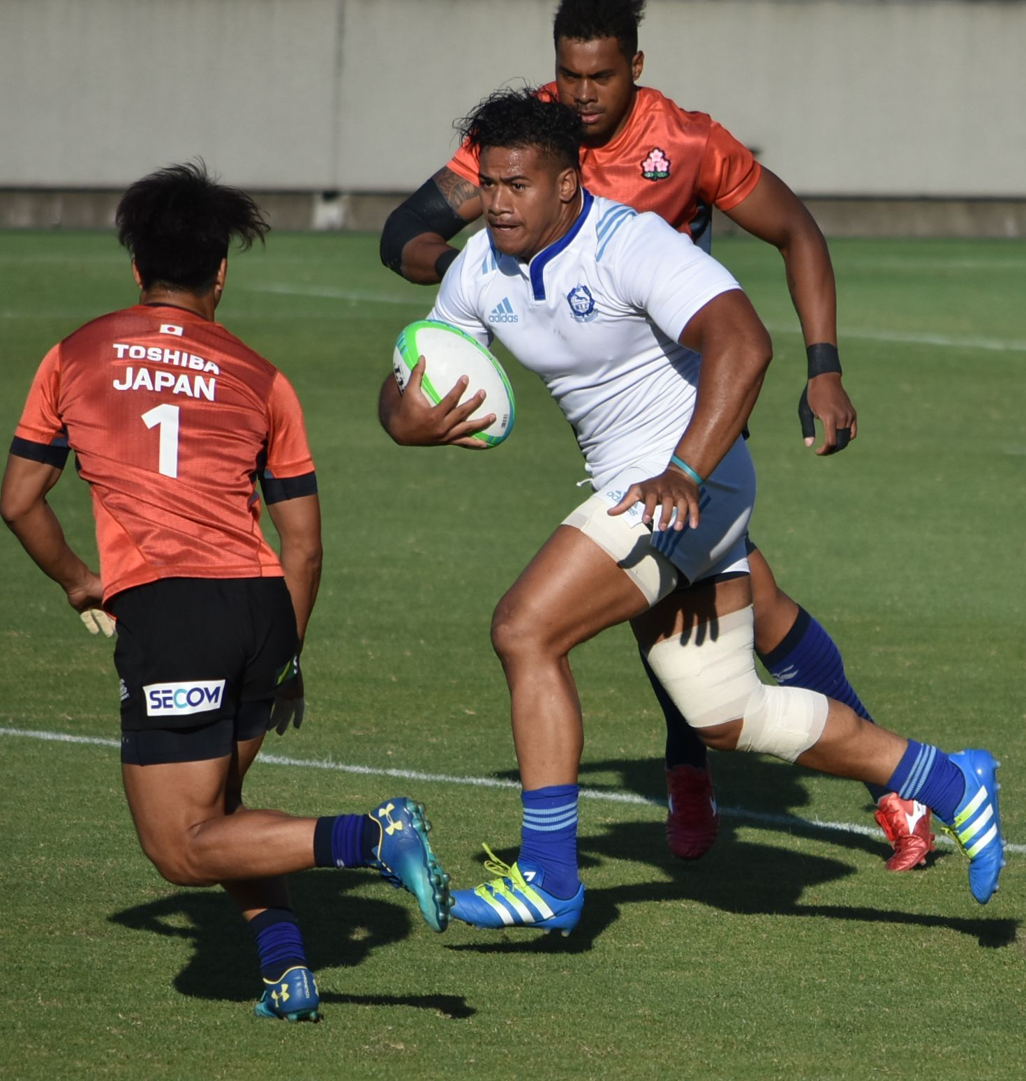 アタアタ・モエアキオラ